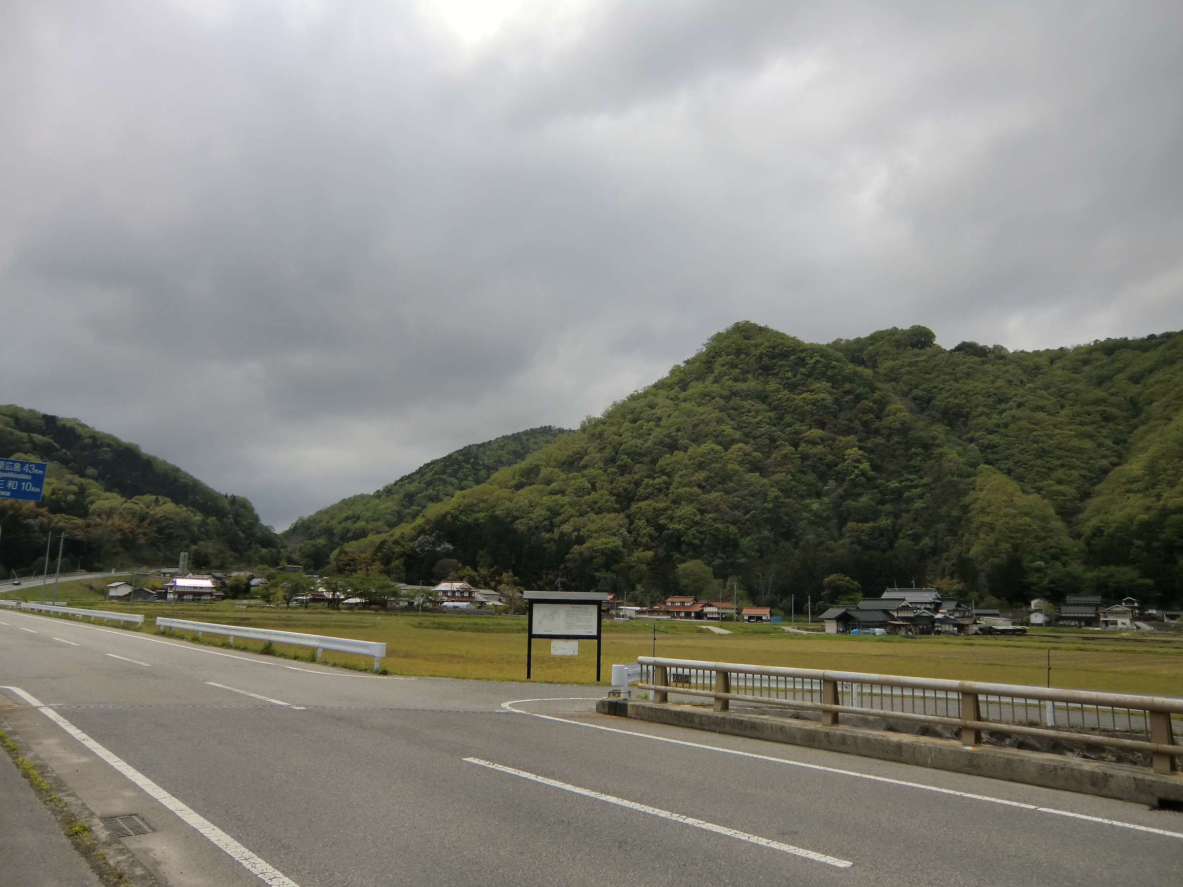 旗返山城の遠景（三次市）